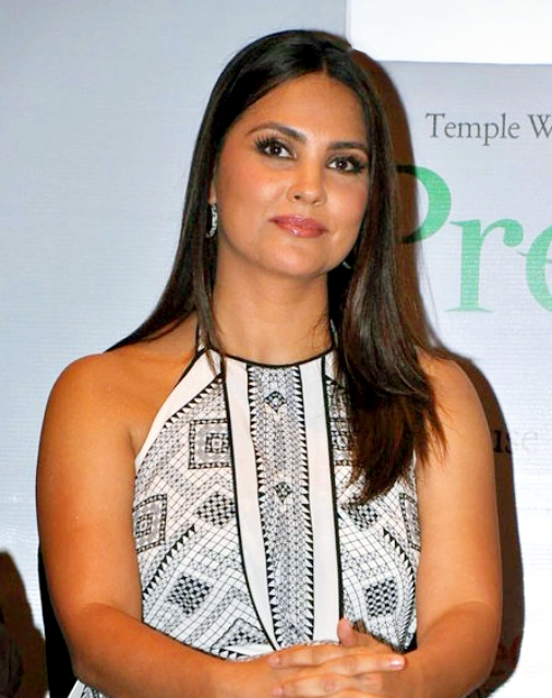 Lara Dutta unveils her 'Prenatal Yoga' DVD